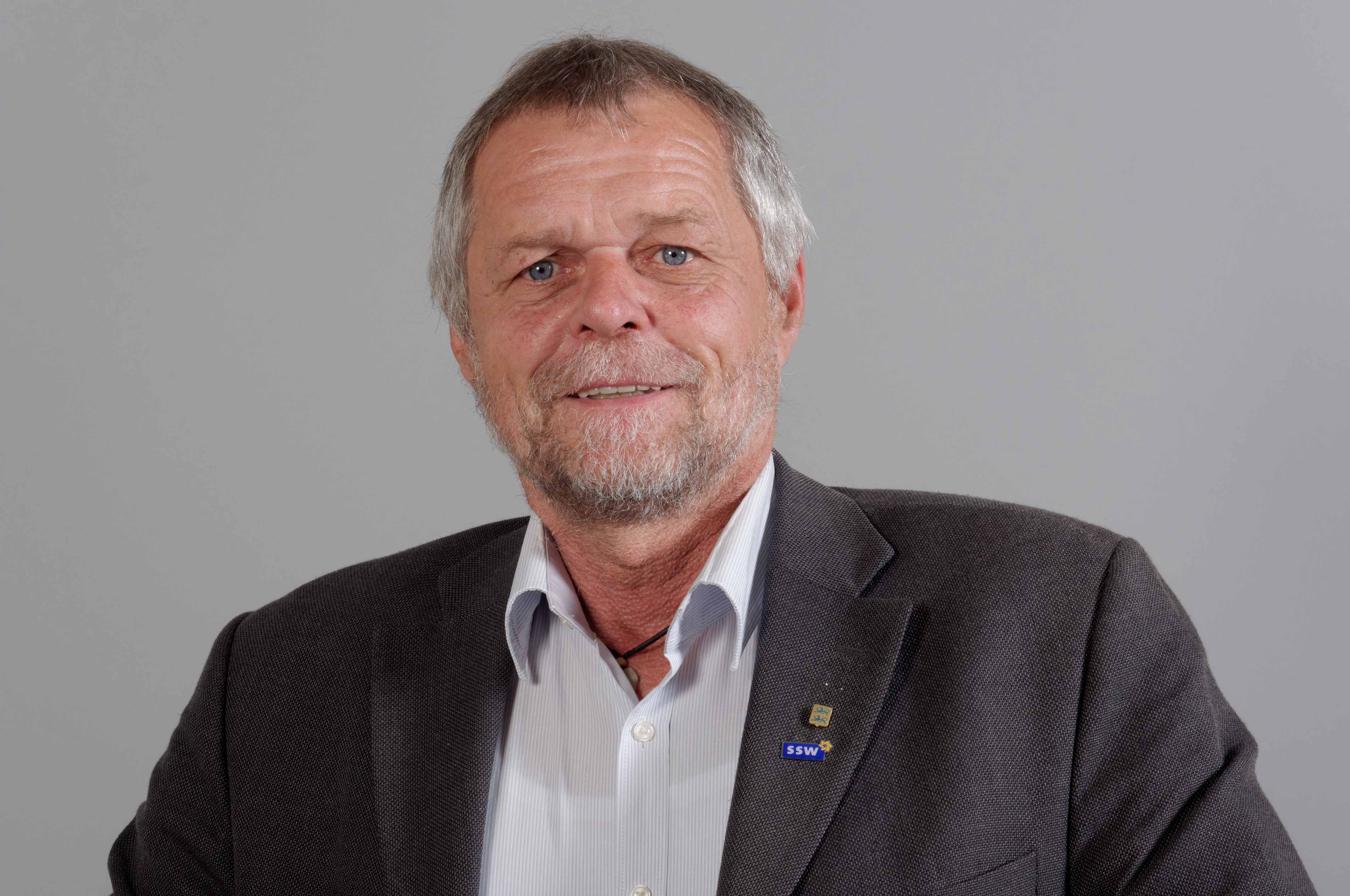 Flemming Meyer, SSW